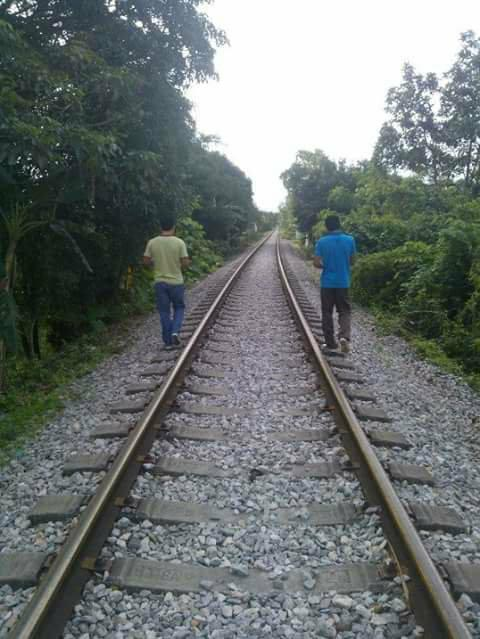 jovenes en vias del tren en el Municipio de Jesus Carranza Veracruz Mexico